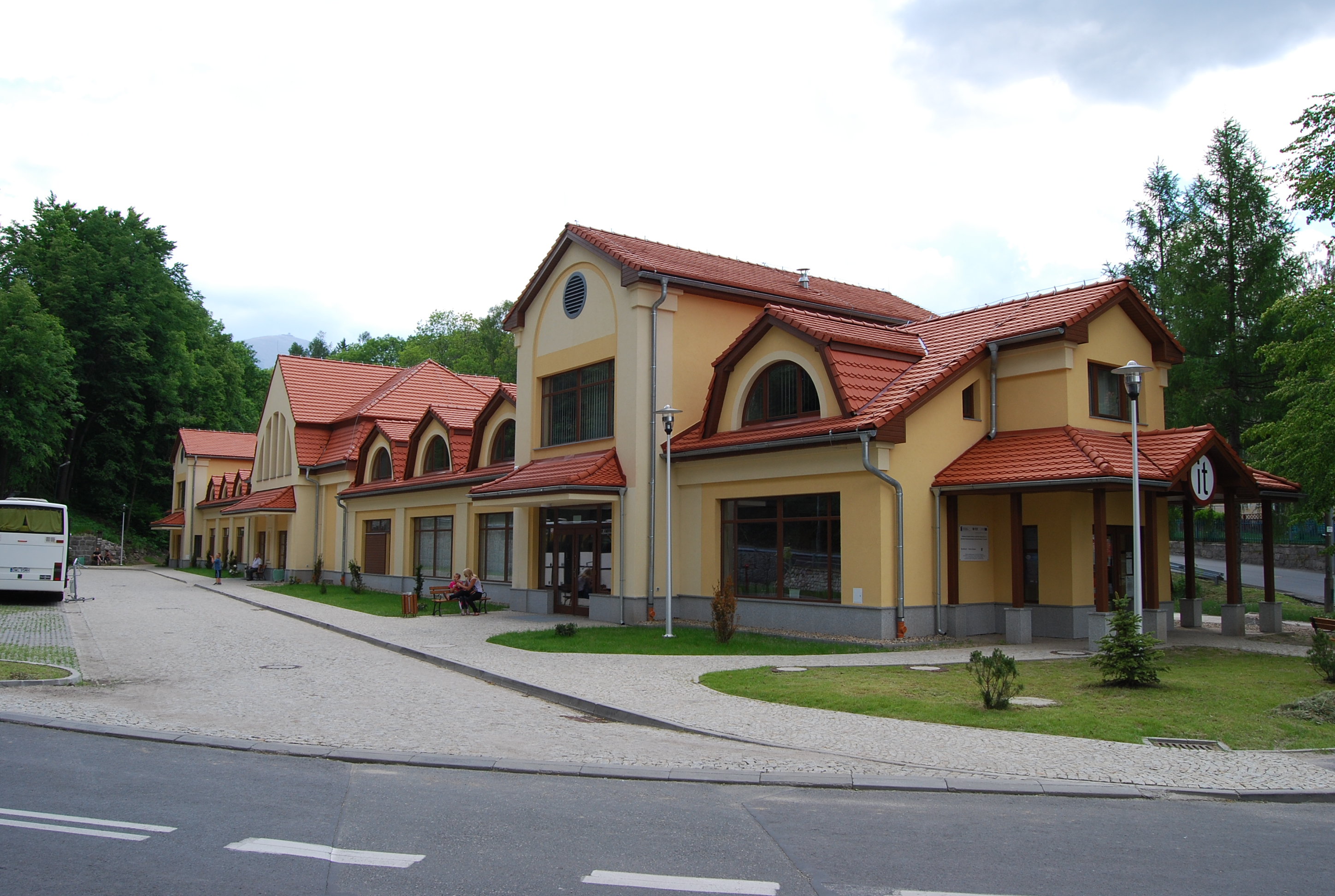 Były dworzec kolejowy w Karpaczu, obecnie mieści się tu Karpaczańskie Centrum Kultury i Turystyki, Miejskie Muzeum Zabawek ze zbiorów Henryka Tomaszewskiego i informacja turystyczna